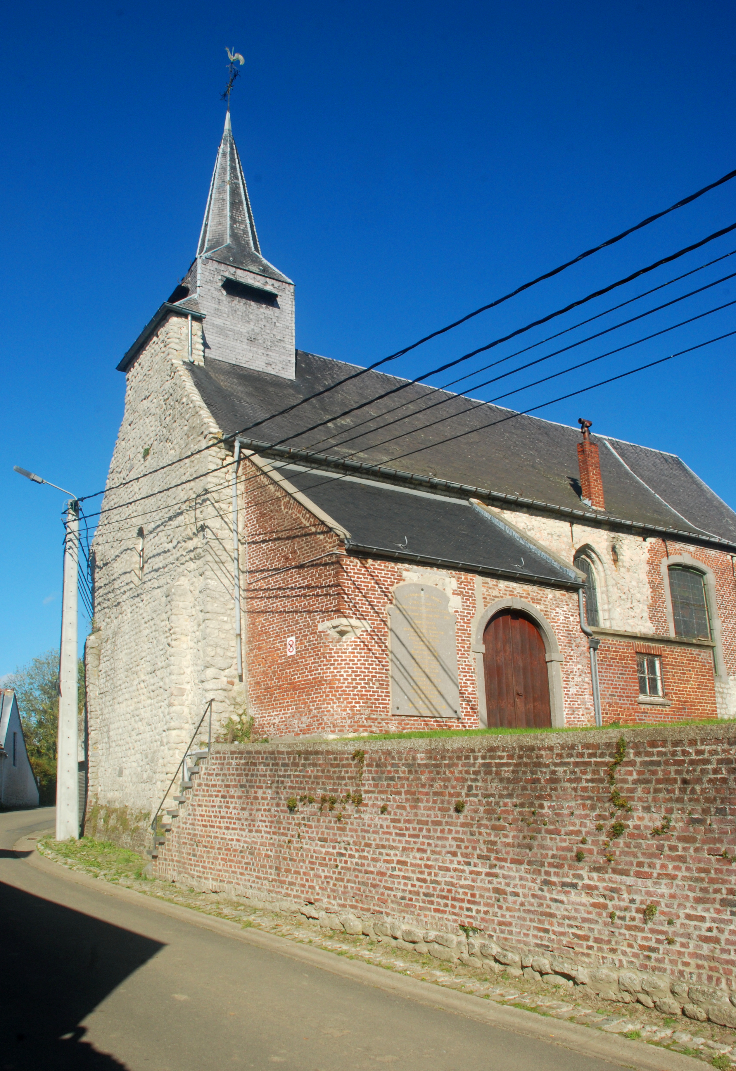 Belgique - Brabant wallon - Nivelles - Eglise Sainte-Marguerite de Thines